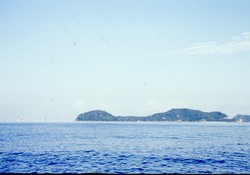 長崎県南松浦郡新上五島町青方郷の青方湾内に実在する無人島